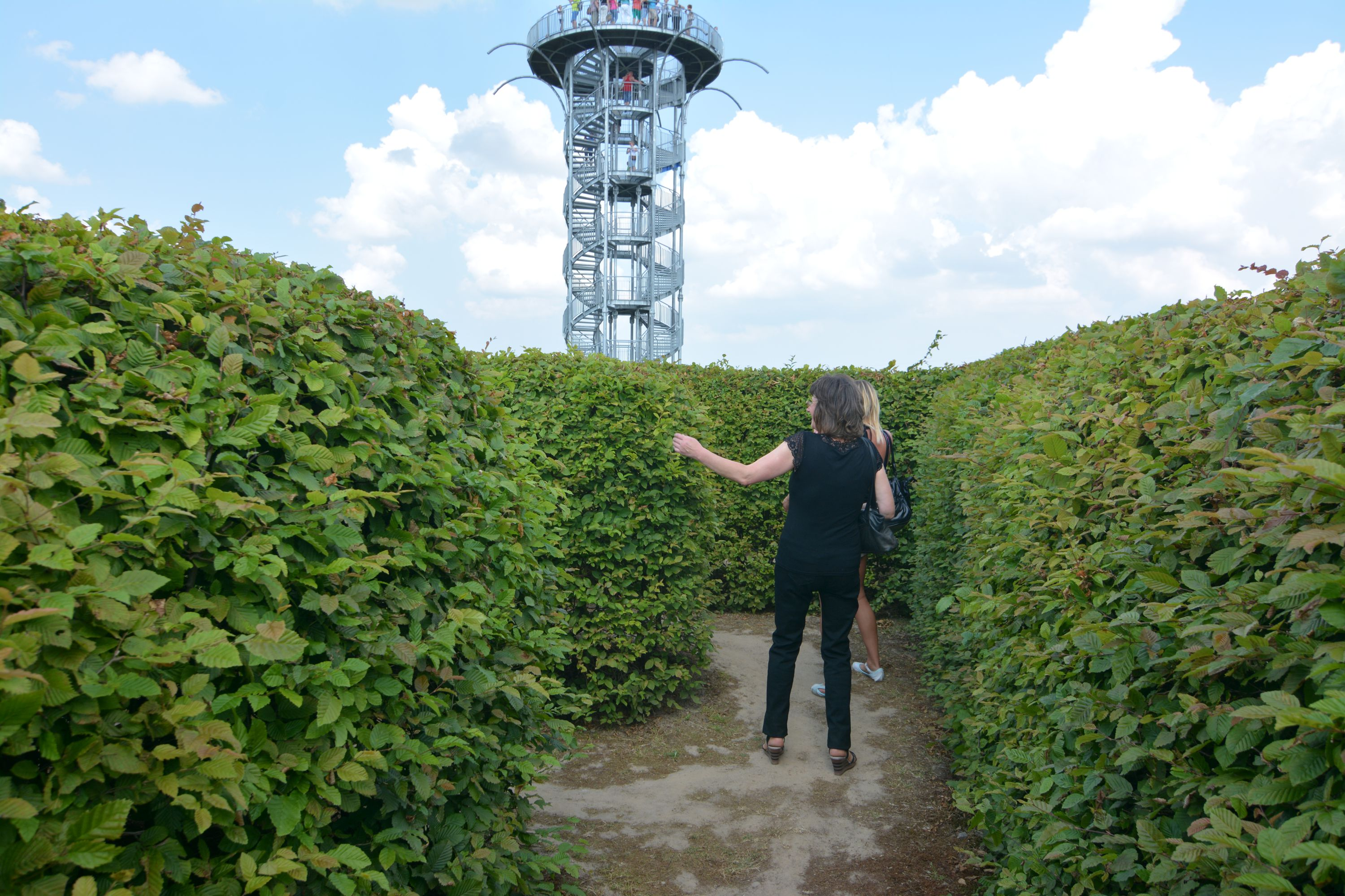 Ogrody Hortulus Spectabilis w Dobrzycy (powiat koszaliński)